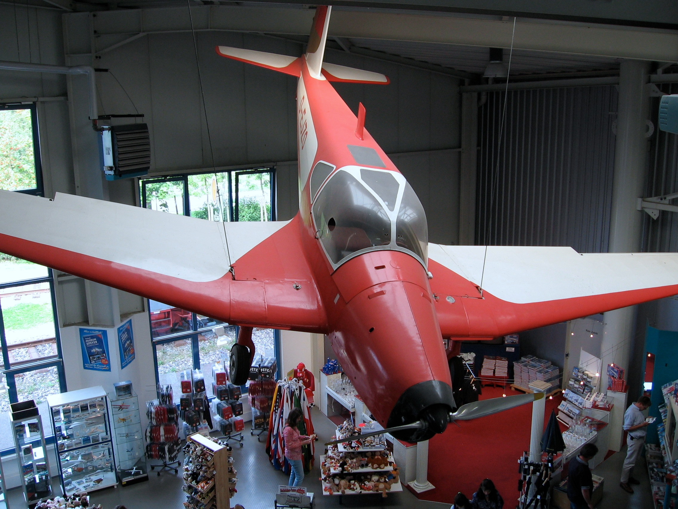 Orlican Mraz M-1D Sokol